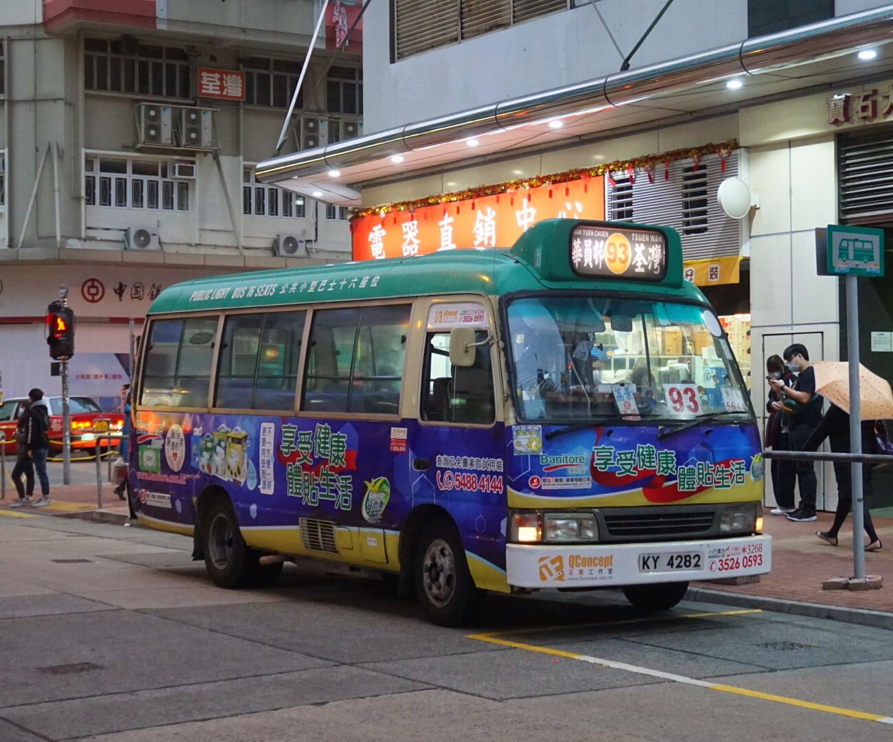 中文（香港）: 新界區專線小巴93線，到達荃灣鹹田街總站落客